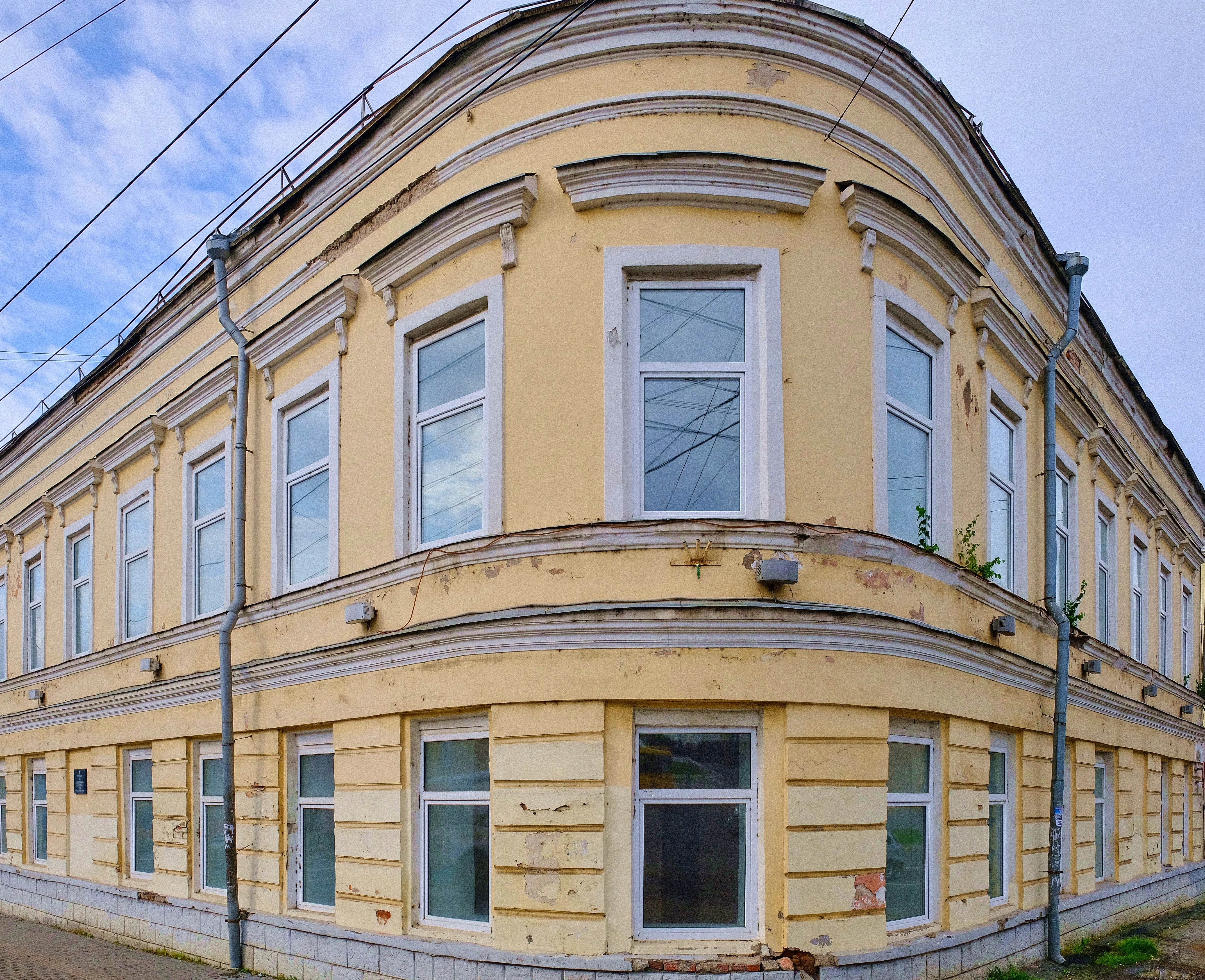 Дом купца Е. Г. Новикова в Ижевске (ул. М. Горького, 69).